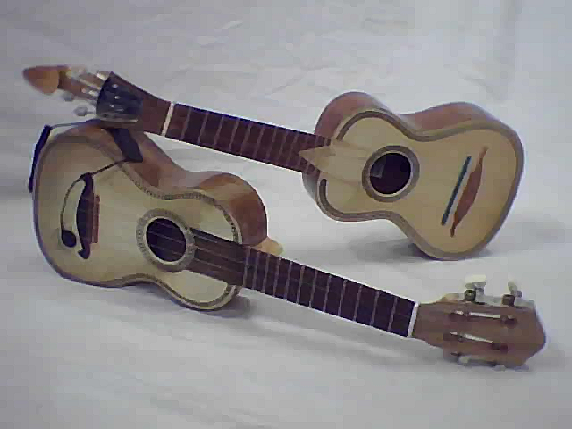 Cavaquinho